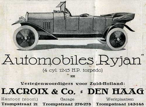 Ryjan (F) - Lacroix & Co, Den Haag advertentie april 1921